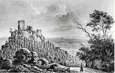 Burg Rötteln, Lithographie nach einer Zeichnung von Maximilian Ring, 1828